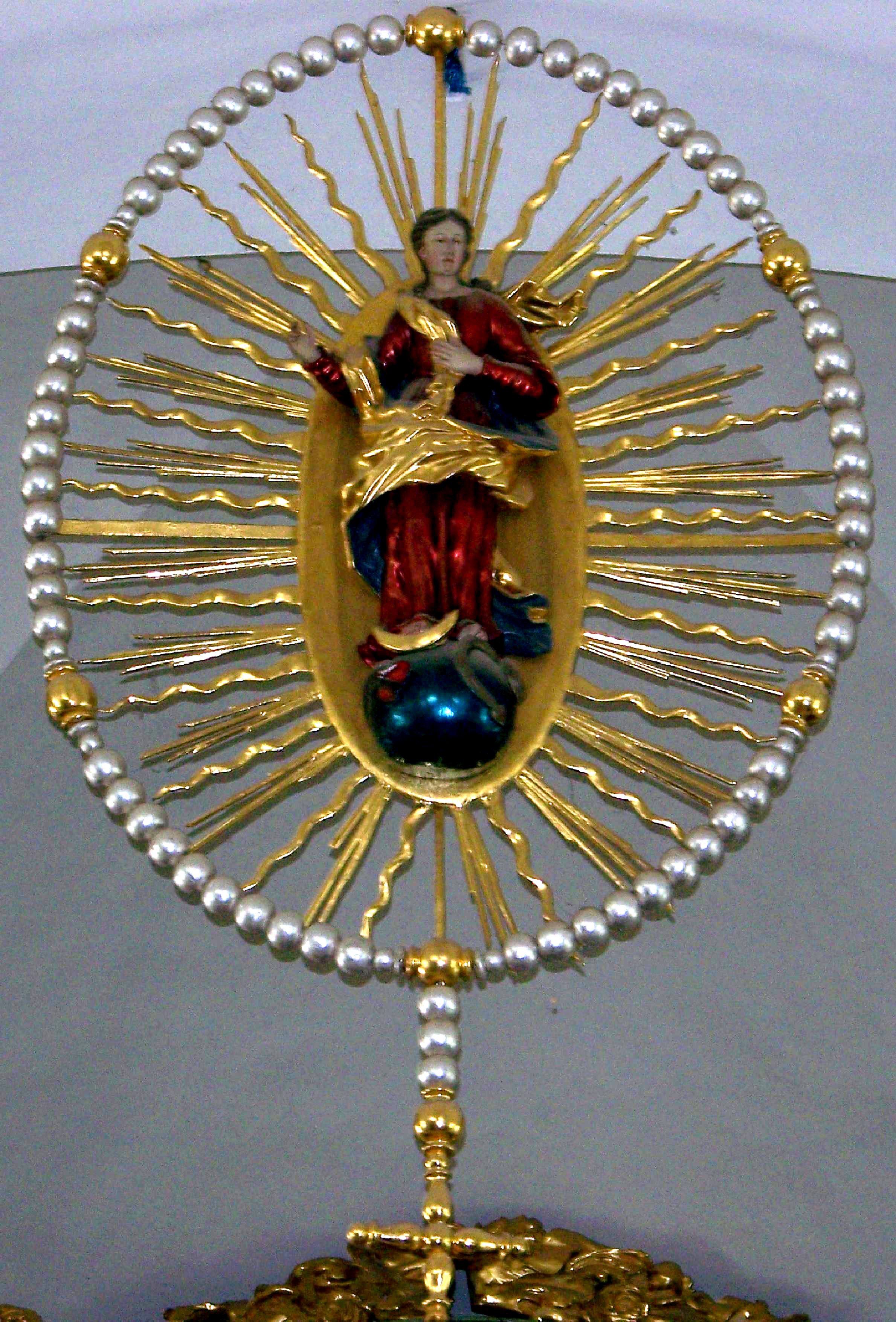 Madonna im Rosenkranz aus der Wallfahrtskirche "Unserer Lieben Frau" in Premenreuth